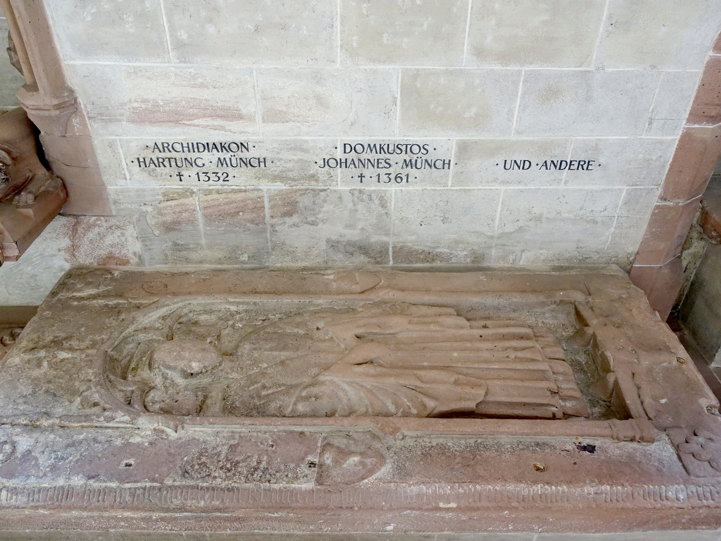 Hartung Münch (1265–1332), Bischof von Basel. Domkustos Johannes Münch 1361, Figurengrabmal im Basler Münster